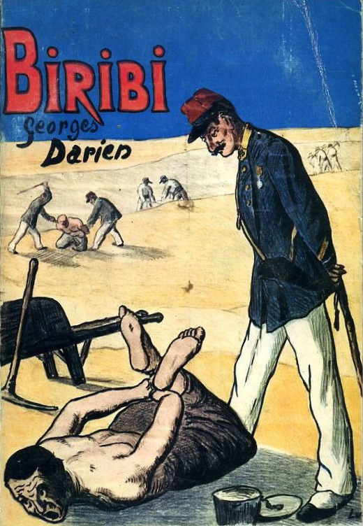 Illustration sur le bagne militaire de Biribi